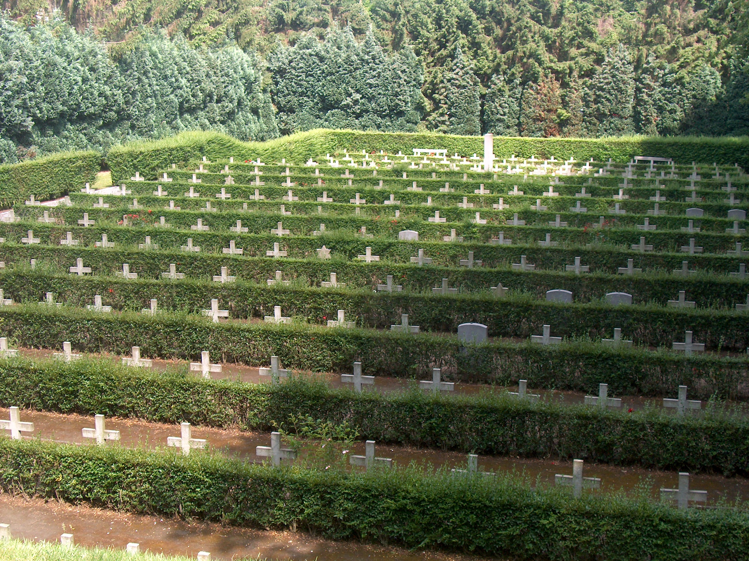 L'enclos des fusillés, rue Colonel Bourg à Schaerbeek, Bruxelles, Belgique.